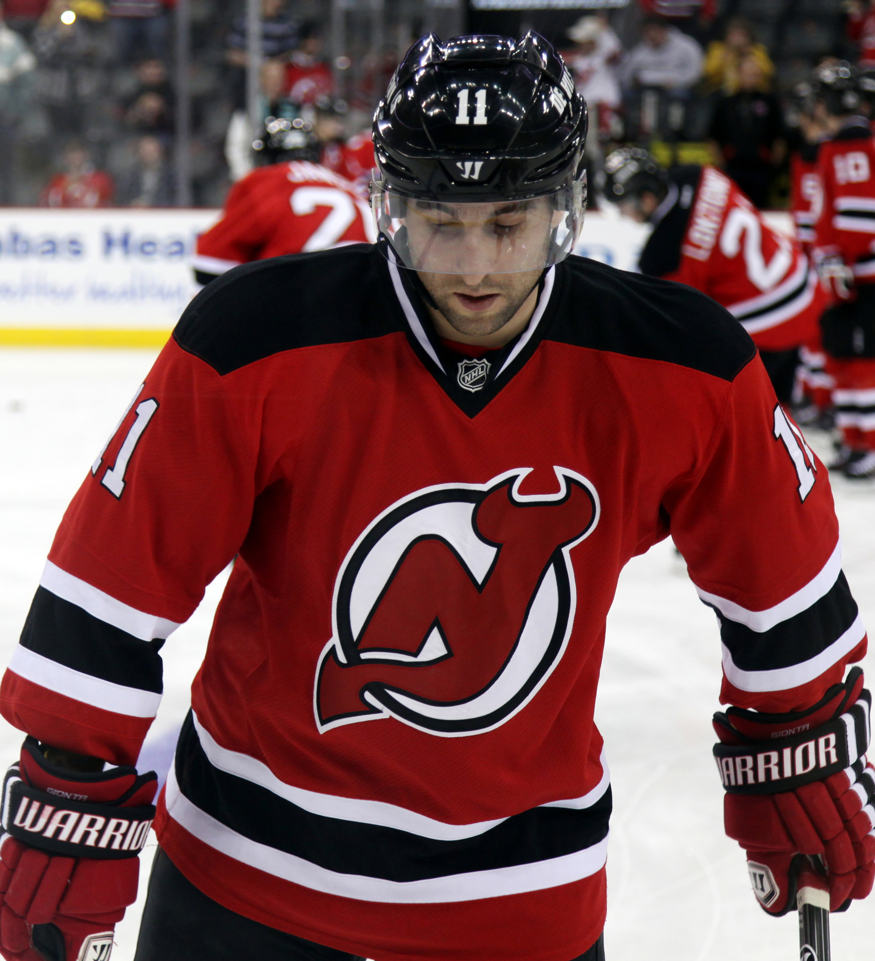 Gionta in 2014.